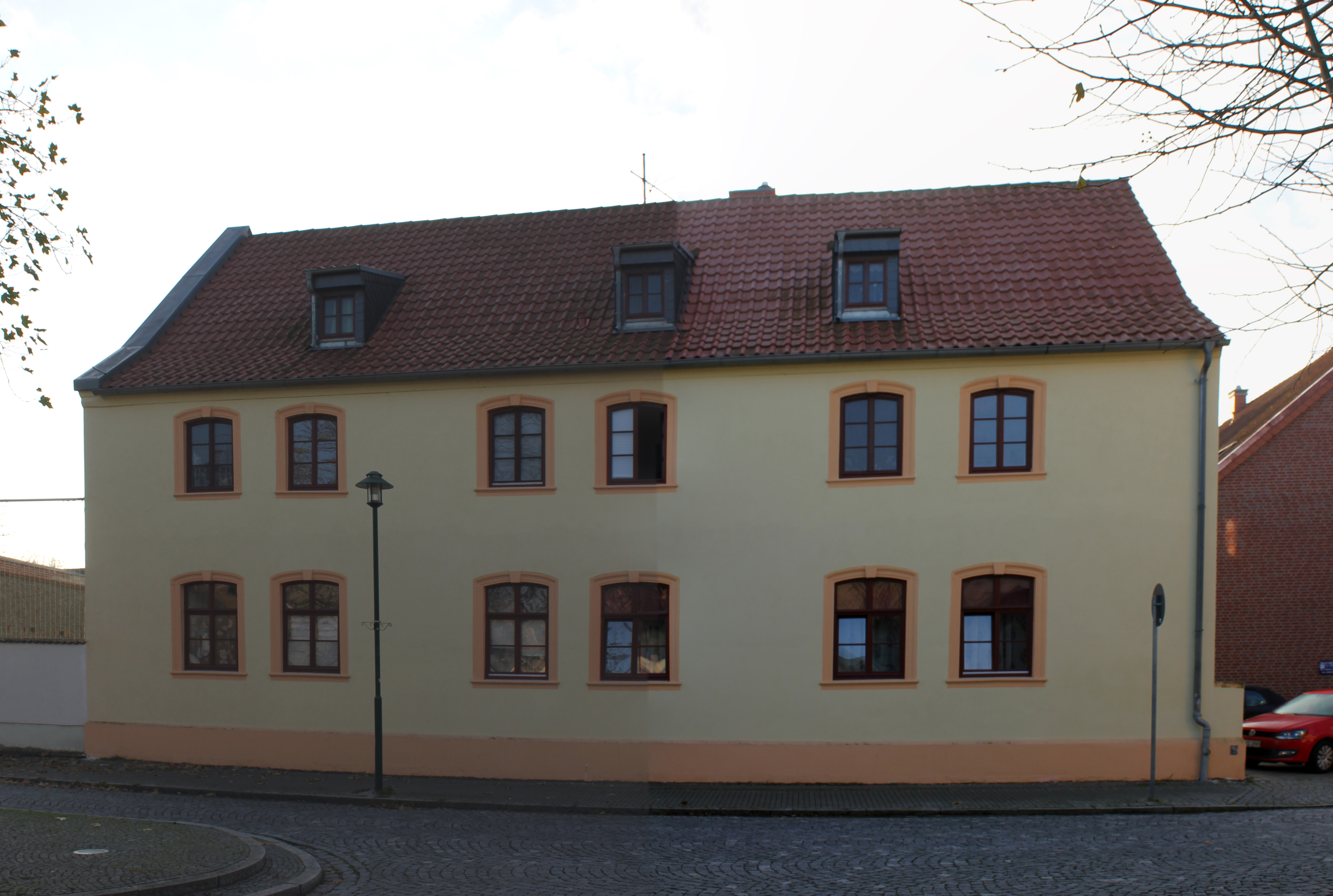 Wohnhaus, Ernst-Thälmann-Str.21, Barleben